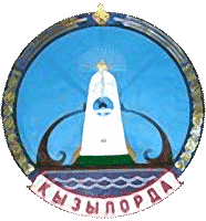 Герб города Кзыл-Орда